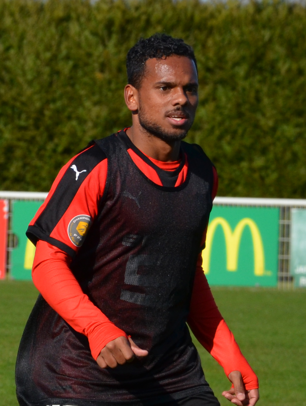 Photographie de Kermit Erasmus lors d'un match de CFA2 opposant le FC Saint-Lô au Stade rennais le 9 avril 2016.